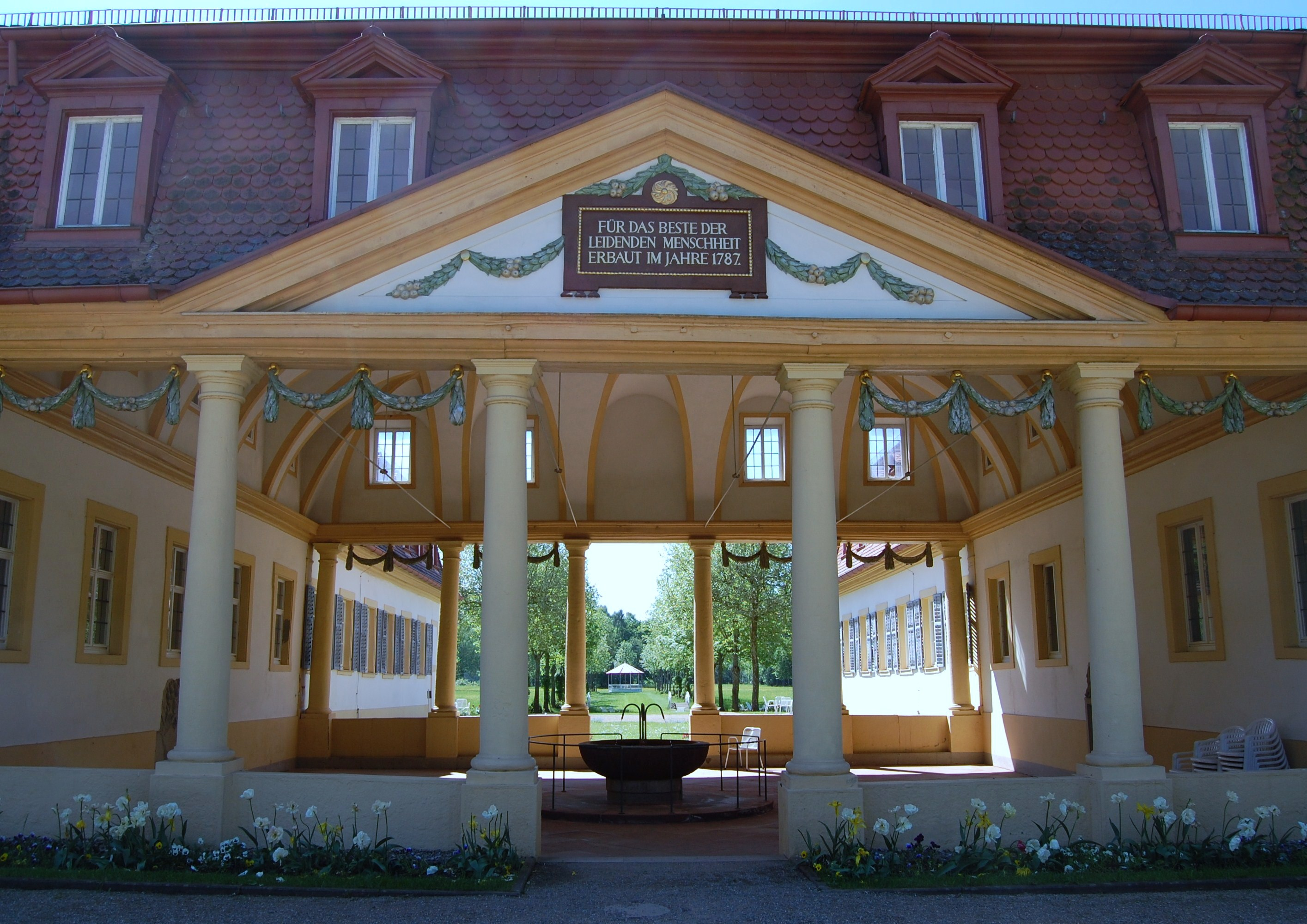 Brunnentempel in Bad Bocklet